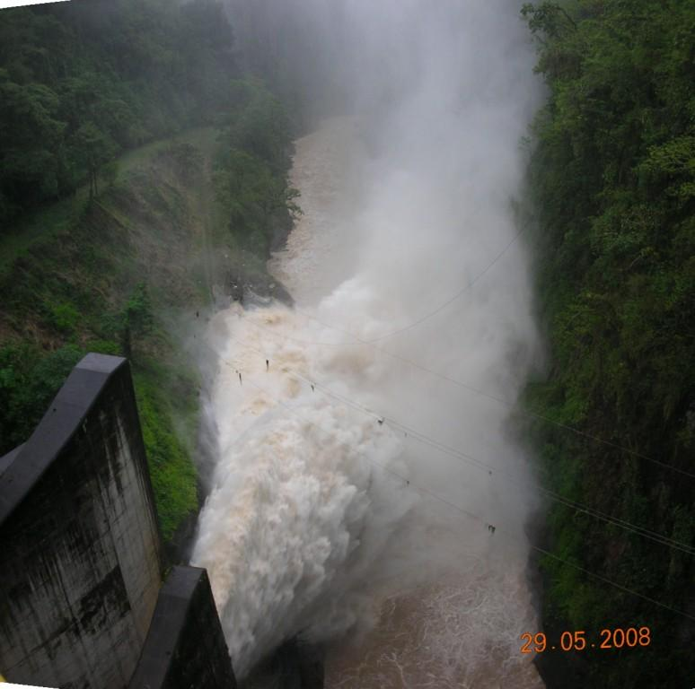 P. H. Cachí-Descarga de Fondo